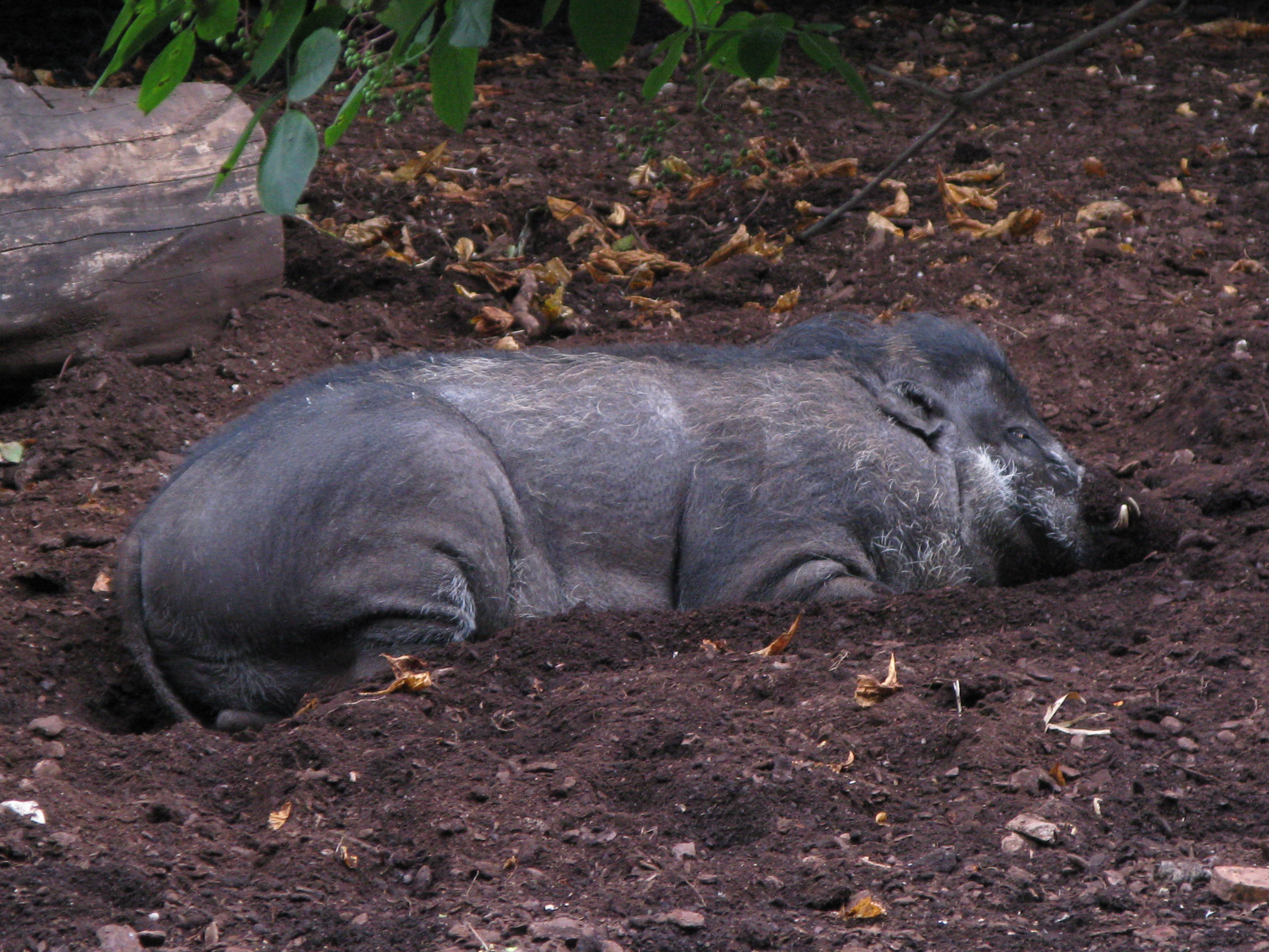 Sanglier des visayas (sus cebifrons), ménagerie du Jardin des plantes de Paris.